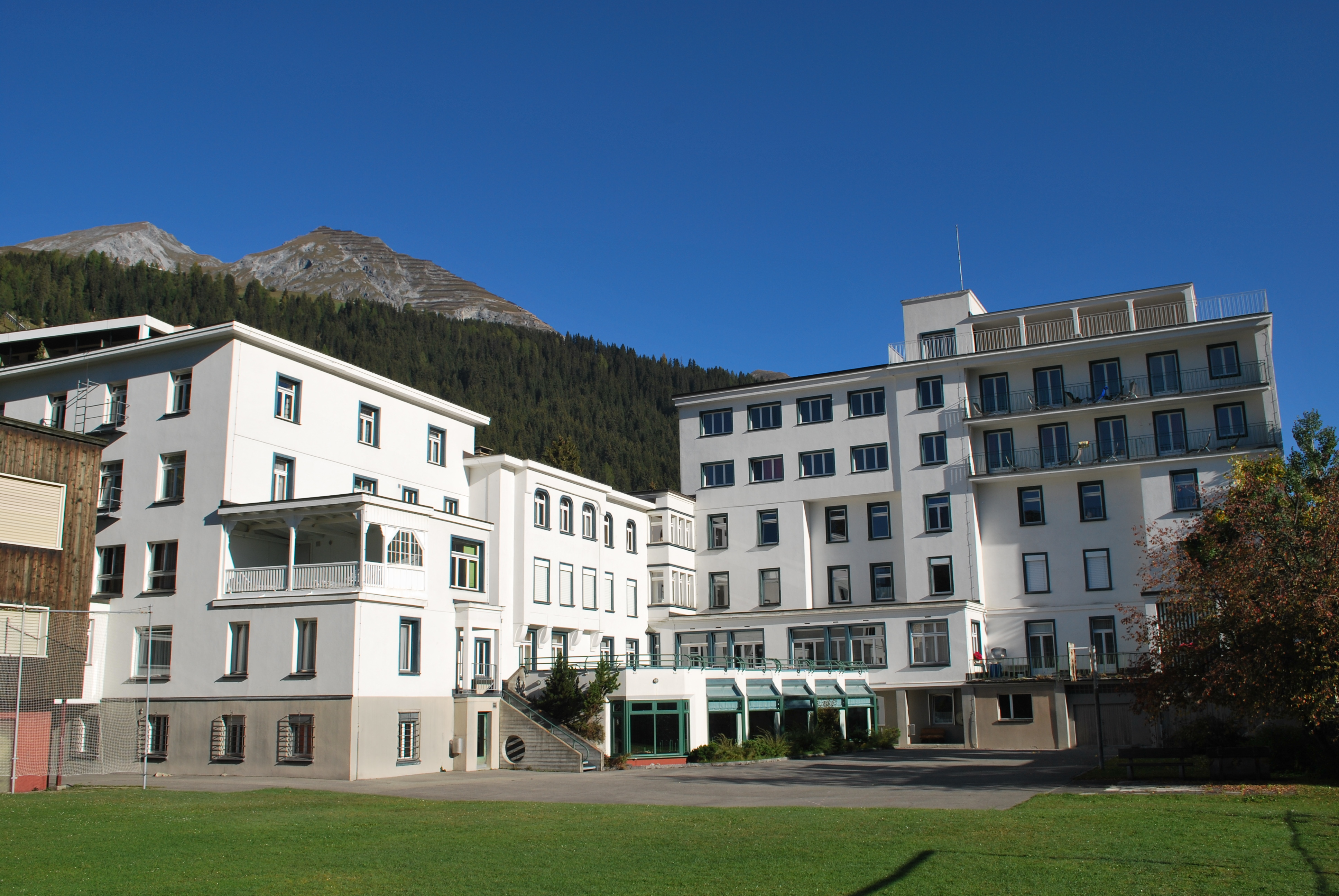 Knaben- und Mädchenhaus, Mensa der SAMD